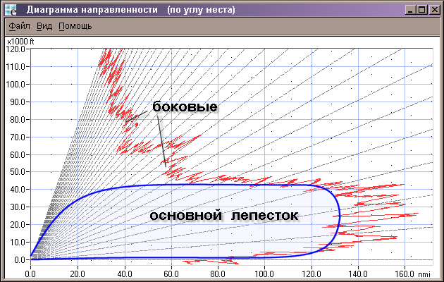 Диаграмма направленности по углу места